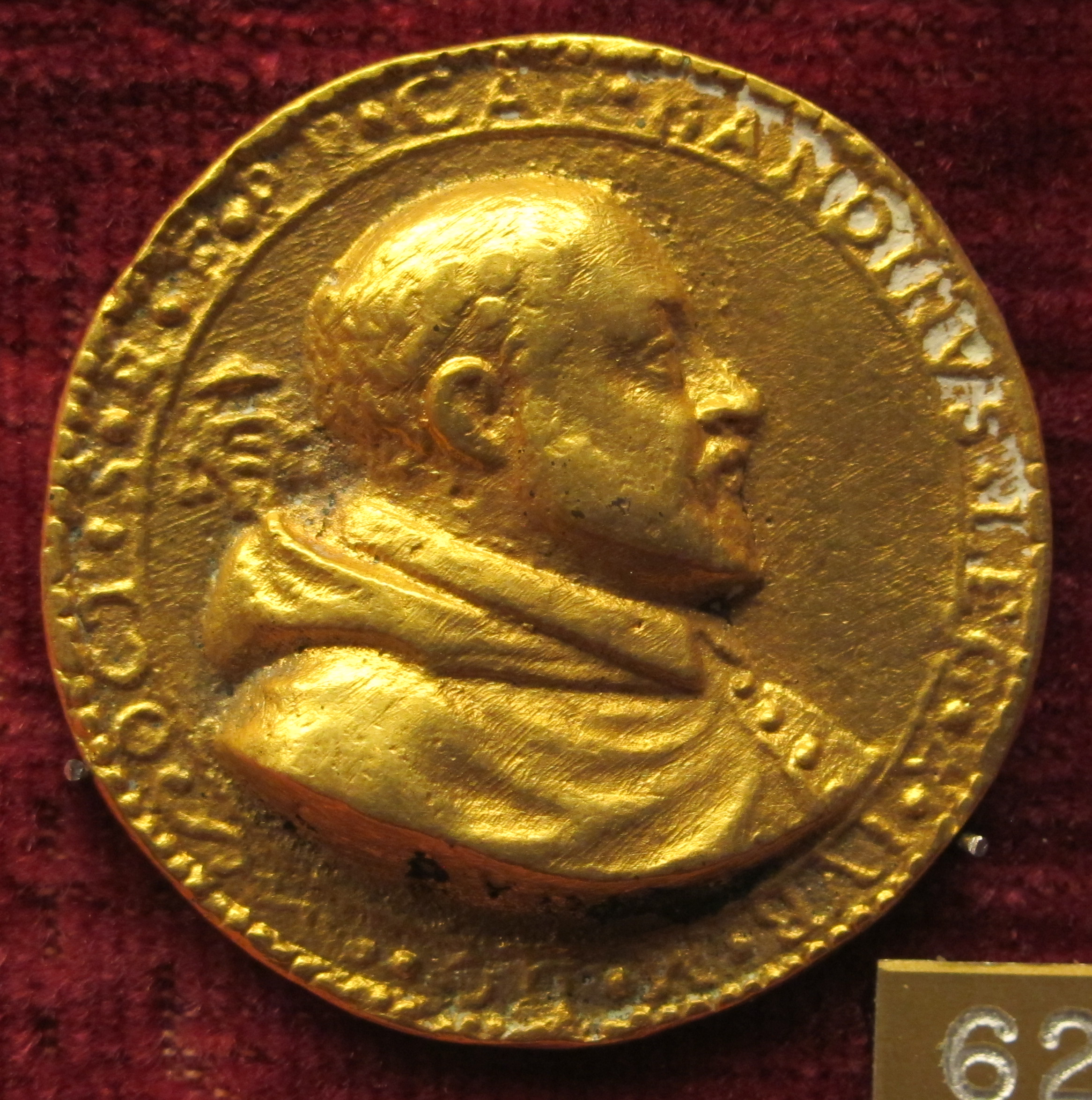 Ottavio Bandini (1558-1629), medaglia, vedi titolo